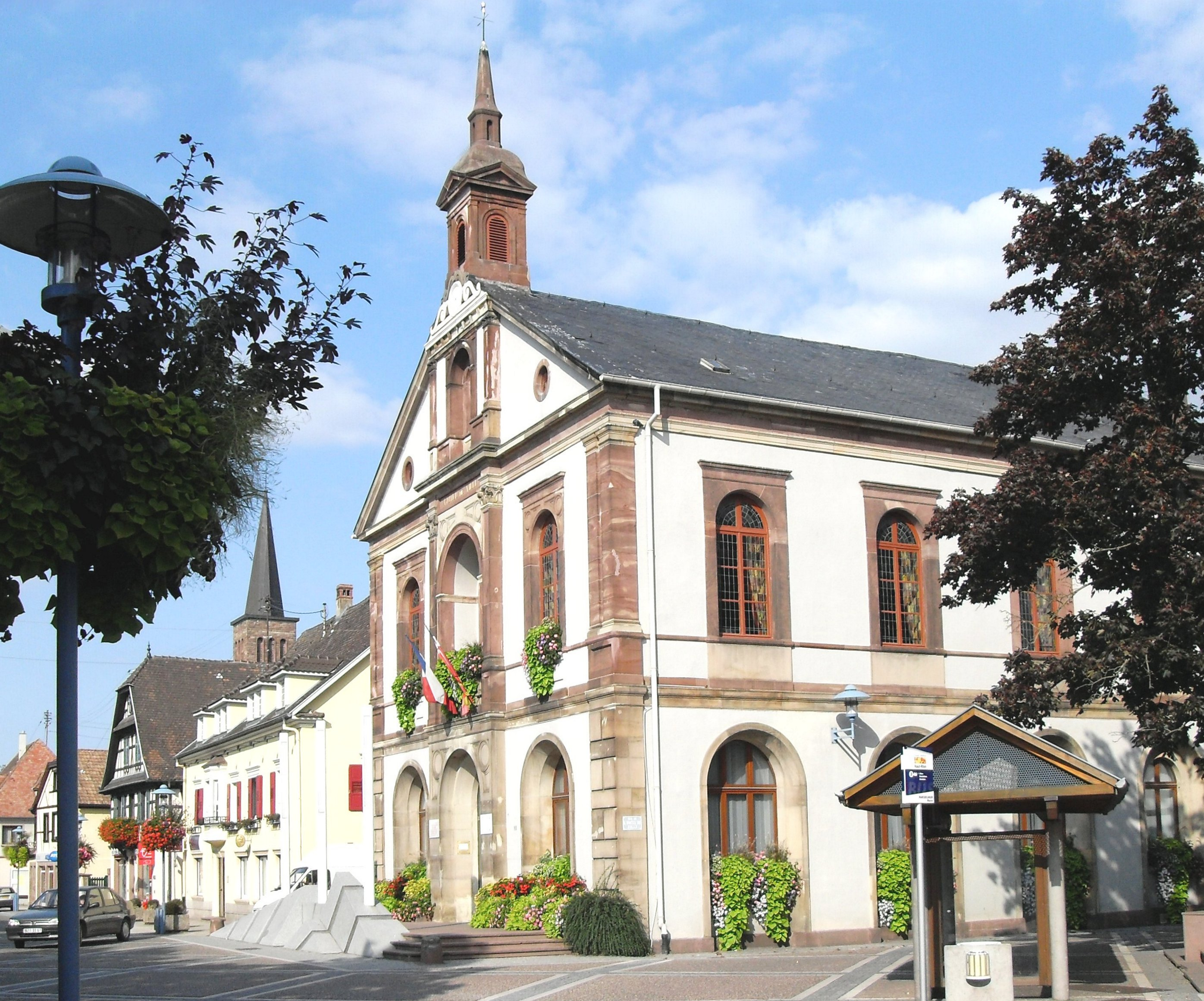 Hôtel de ville de Marckolsheim